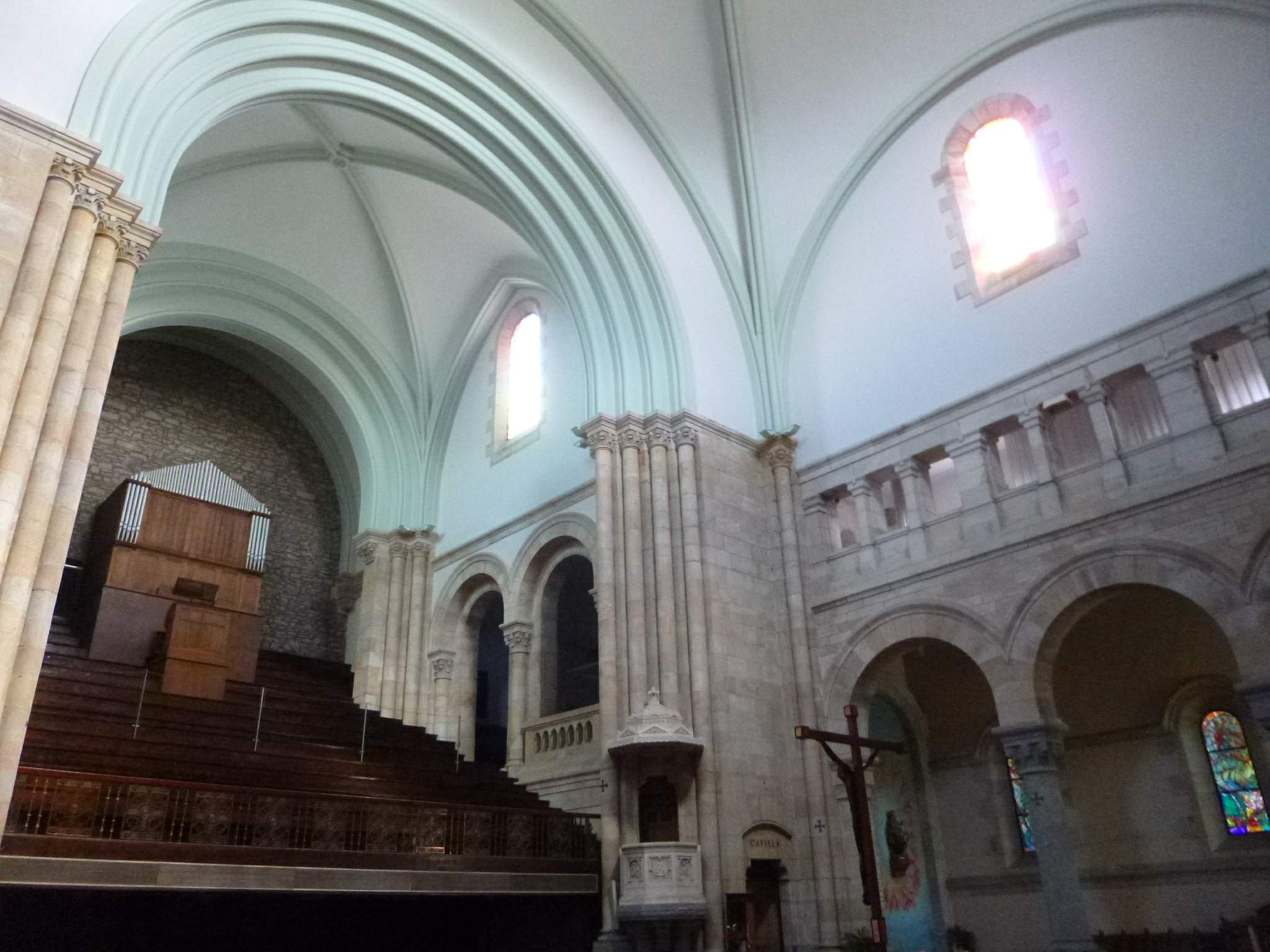 Santuario de Urkiola (Bizkaia)